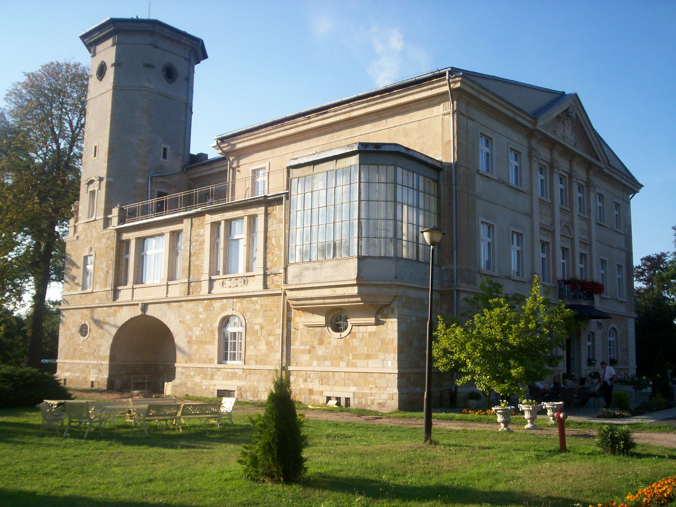 Polska. Powiat Lwówek Śląski. Pałac we wsi Brunów.